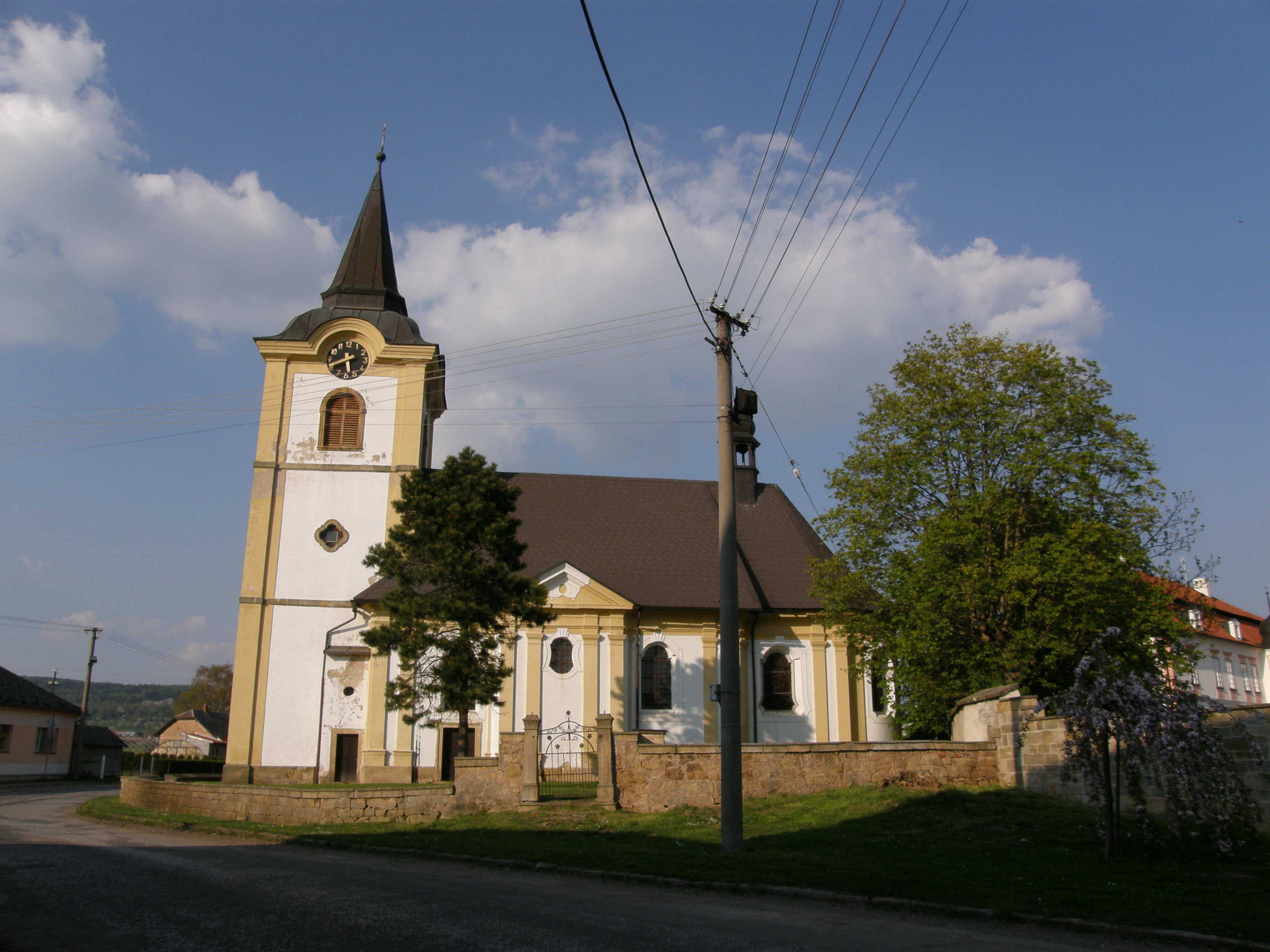 Kostel sv. Prokopa (Sobčice), severovýchodní okraj obce, Sobčice